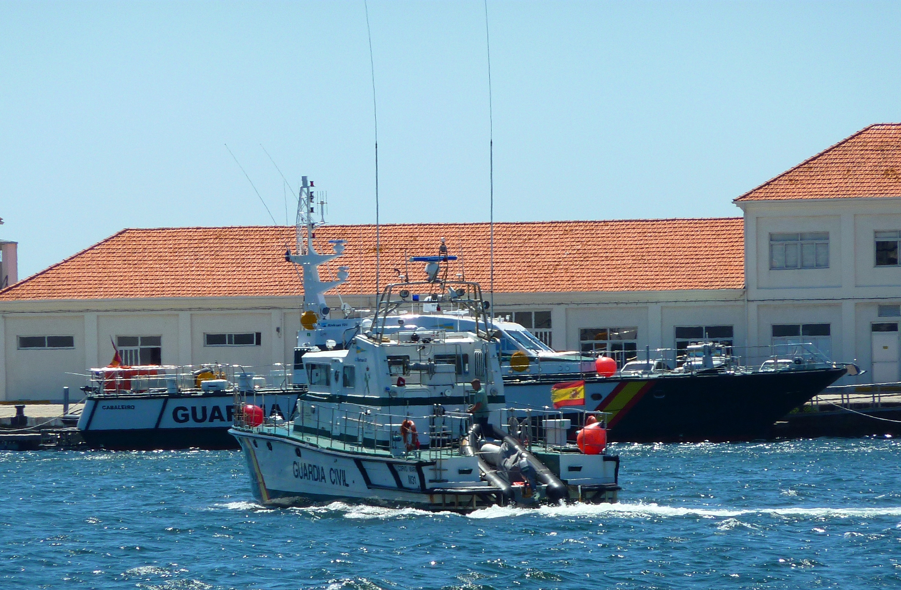 Patrullera clase Rodman-58 "Corvo Mariño" de la Guardia Civil.